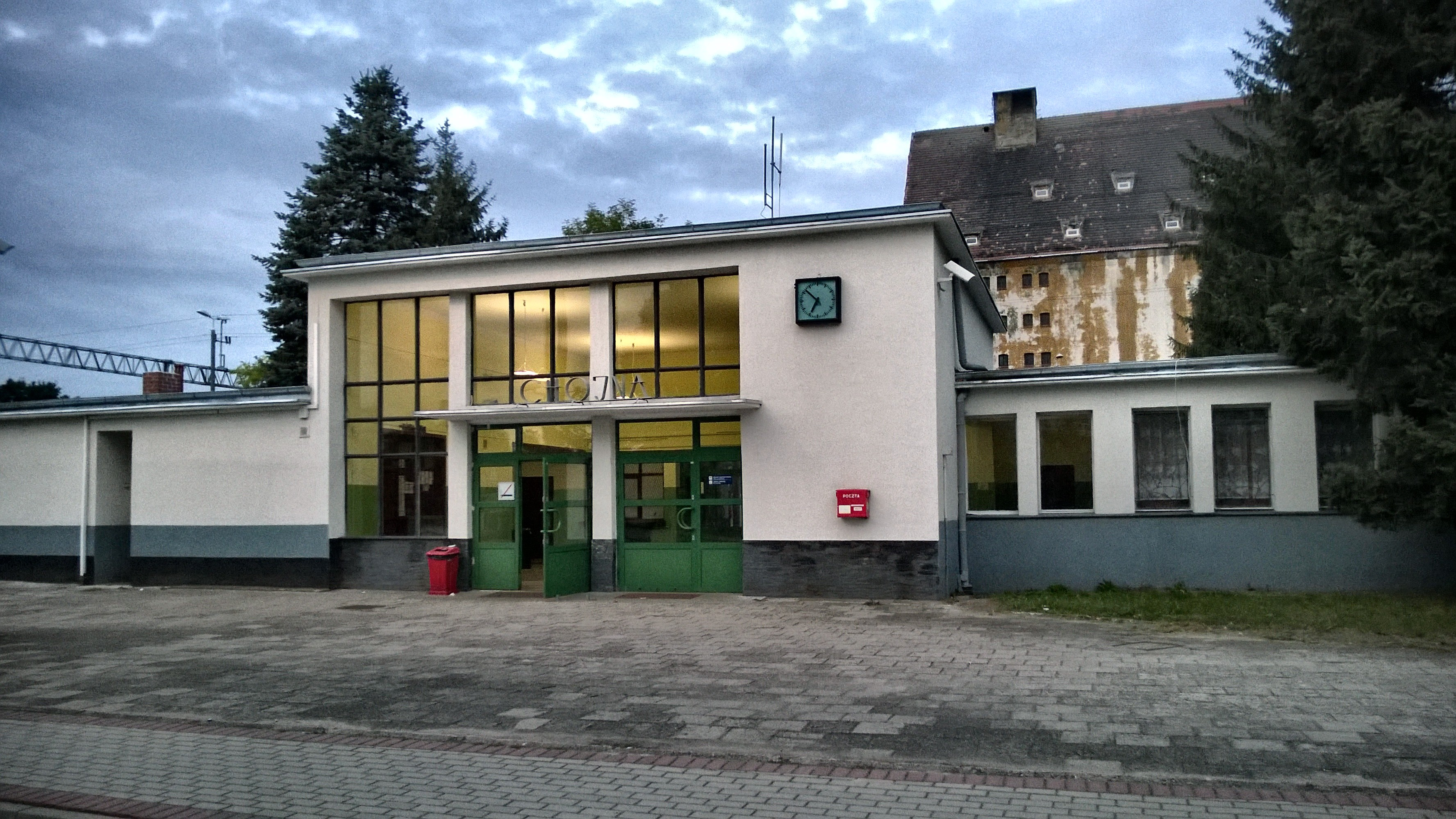 Dworzec Kolejowy Chojna